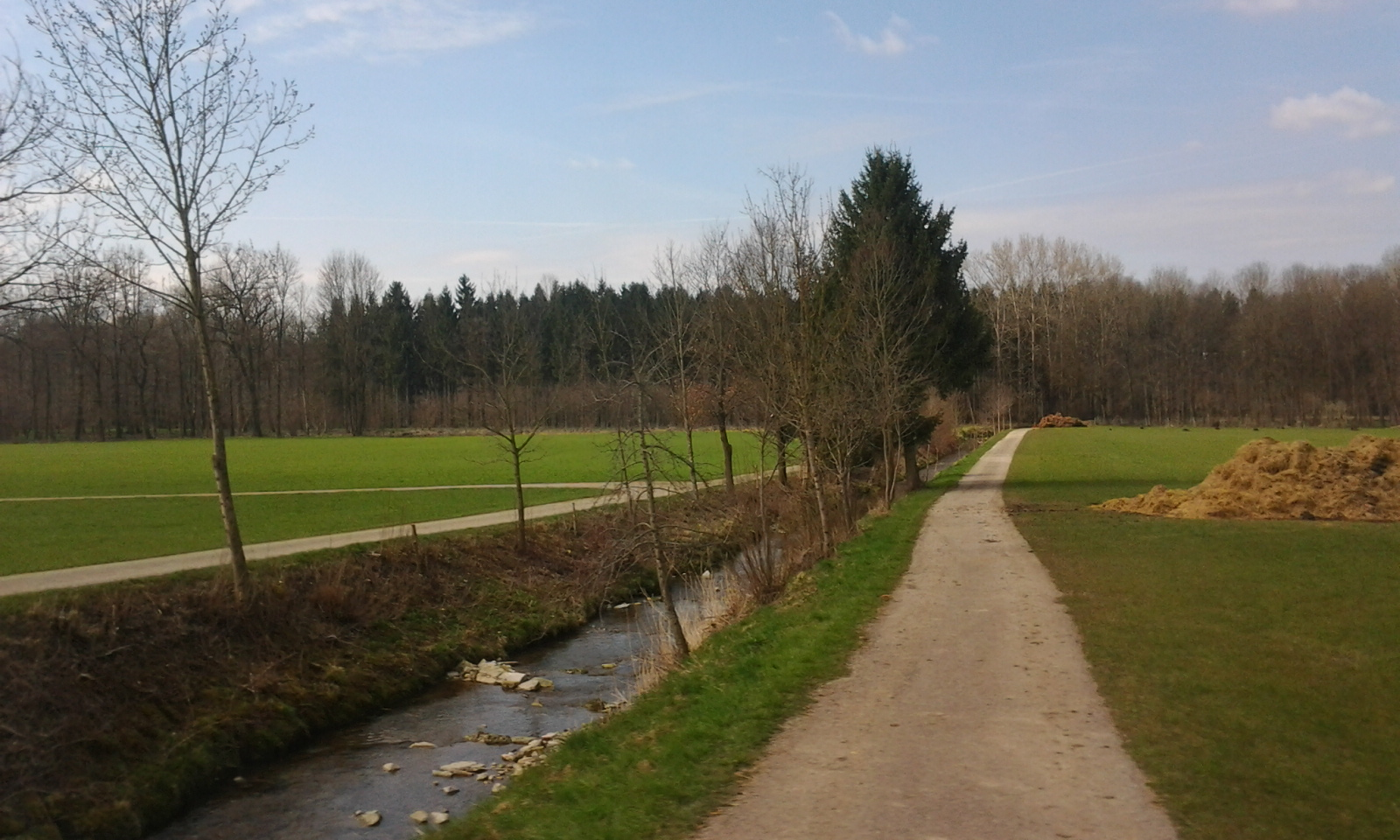 Der Antheringer Bach im Gemeindegebiet von Anthering, Bezirk Salzburg-Umgebung, kurz vor dem Eintritt in die Salzachau, wo er in der Folge zusammen mit dem Bruckbach den Reitbach bildet. Aufnahme aus einem Zug der Salzburger Lokalbahn.